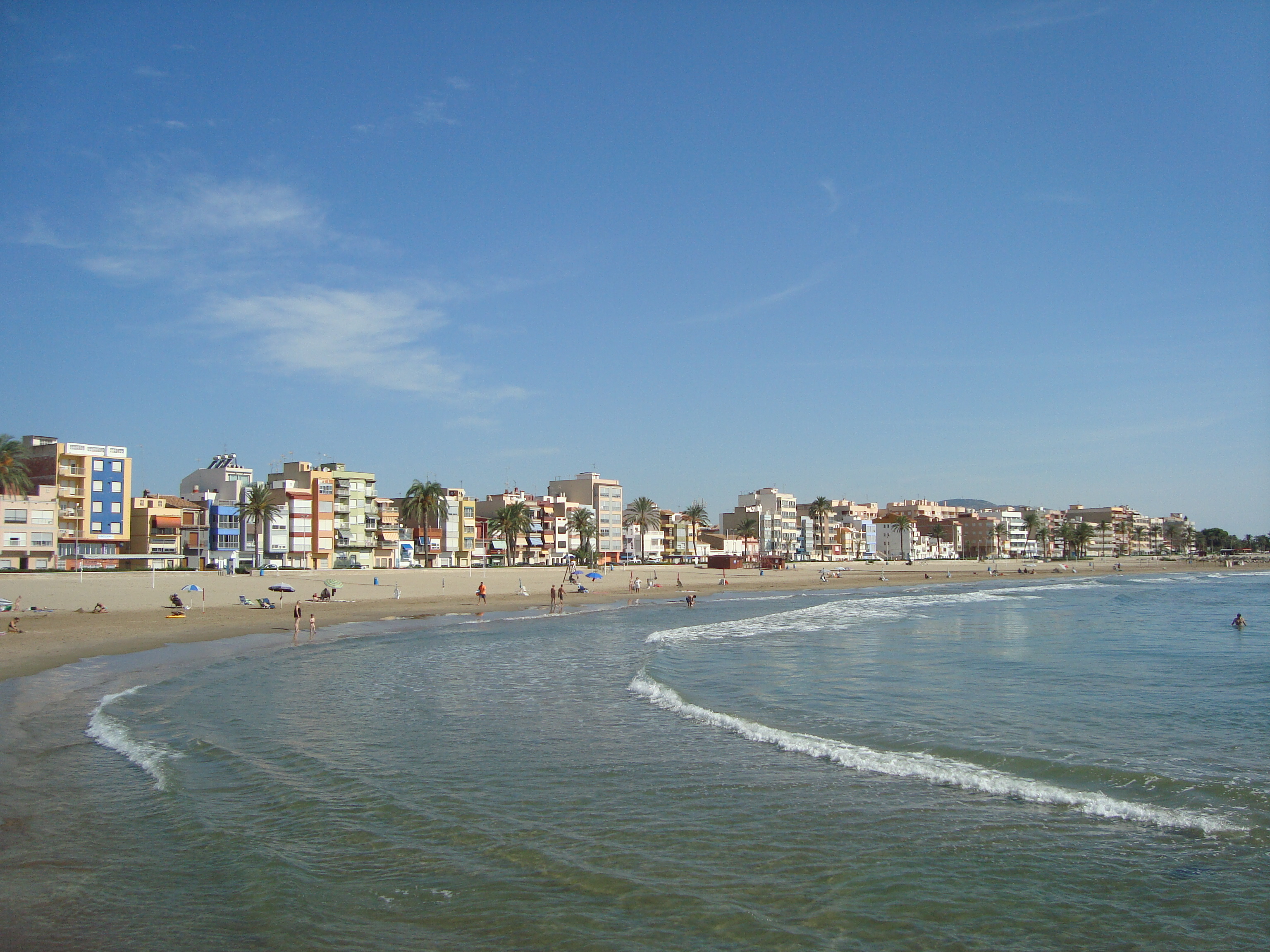 La playa Torrenostra y la población de Torrenostra están ya dominadas por el carácter que imprime la presencia de la zona de humedal del Paraje Natural del Prat de Cabanes-Torreblanca, que constituye un amplio espacio protegido que dispone de un centro de interpretación en la población de Torrenostra, localidad esta que constituye una de las puertas de entrada de este inestimable paraje del patrimonio natural valenciano. Hacia el sur de Torrenostra, la playa del Prat se ve acompañada de zonas de marjalería con abundante flora y fauna. La playas de Torrenostra son tranquilas y la calidad de sus aguas es excelente.